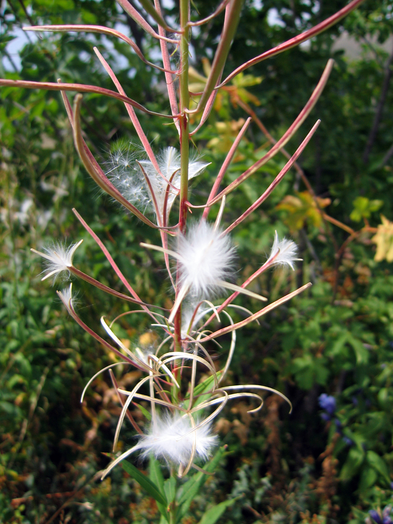 Vrbica sa Biogradske gore (Chamaenerion angustifolium)